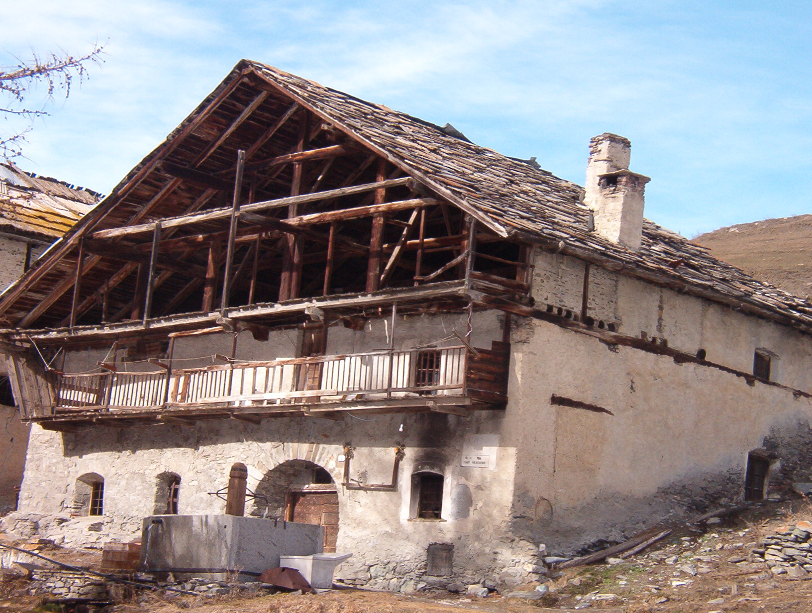 Casa tipica a Laval, frazione di Pragelato - Val Chisone - Provincia di Torino - Italy